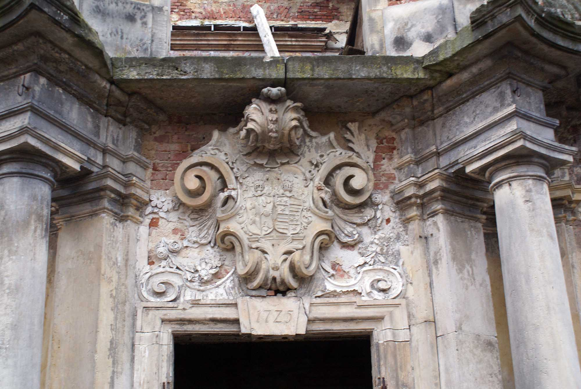 Brzezinka, folwark, XVIII, XIX, XX brak zabytków w zespole